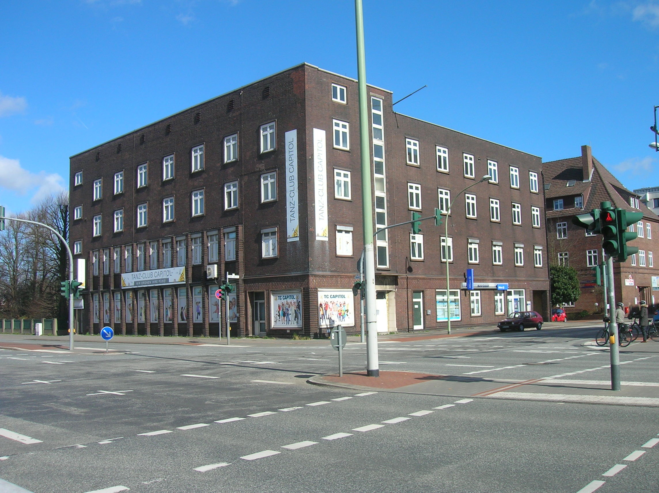 Gebäude am Beginn der Friedrich-Ebert-Straße an der Elbestraße in Bremerhaven